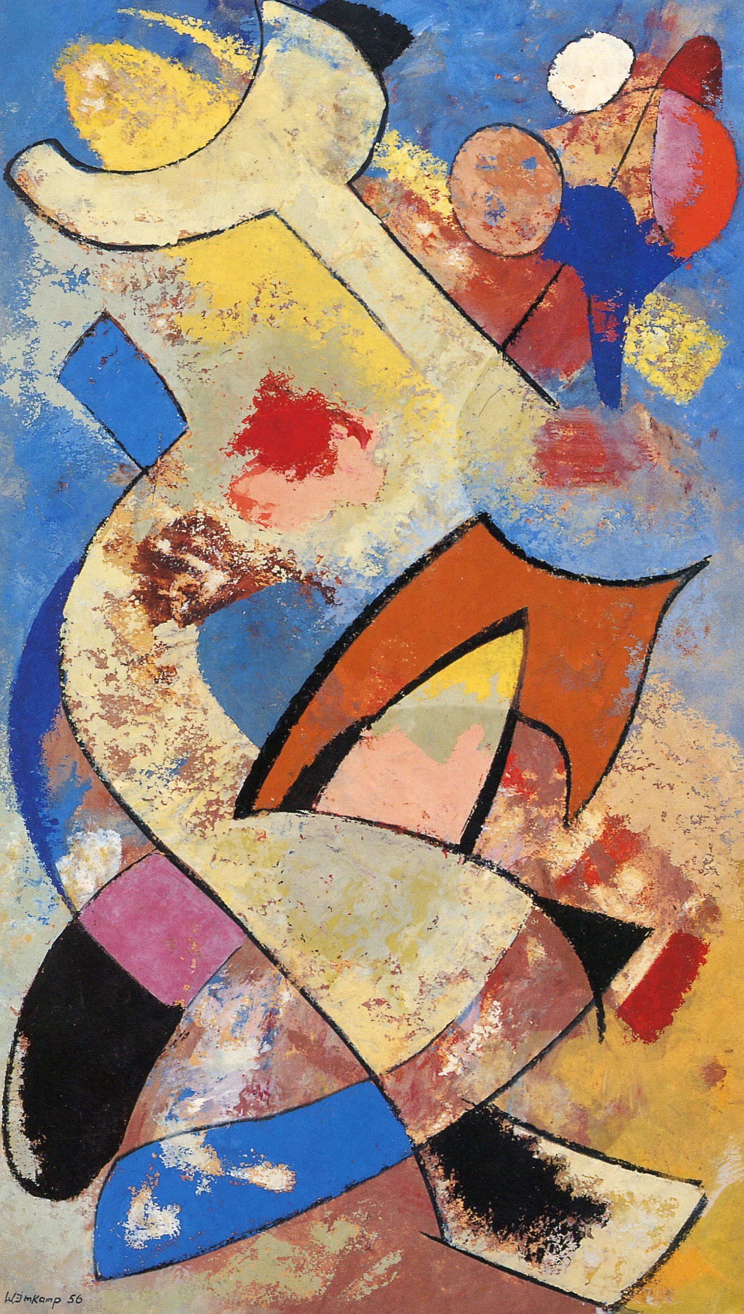 Wilhelm Imkamp "Clownerie"